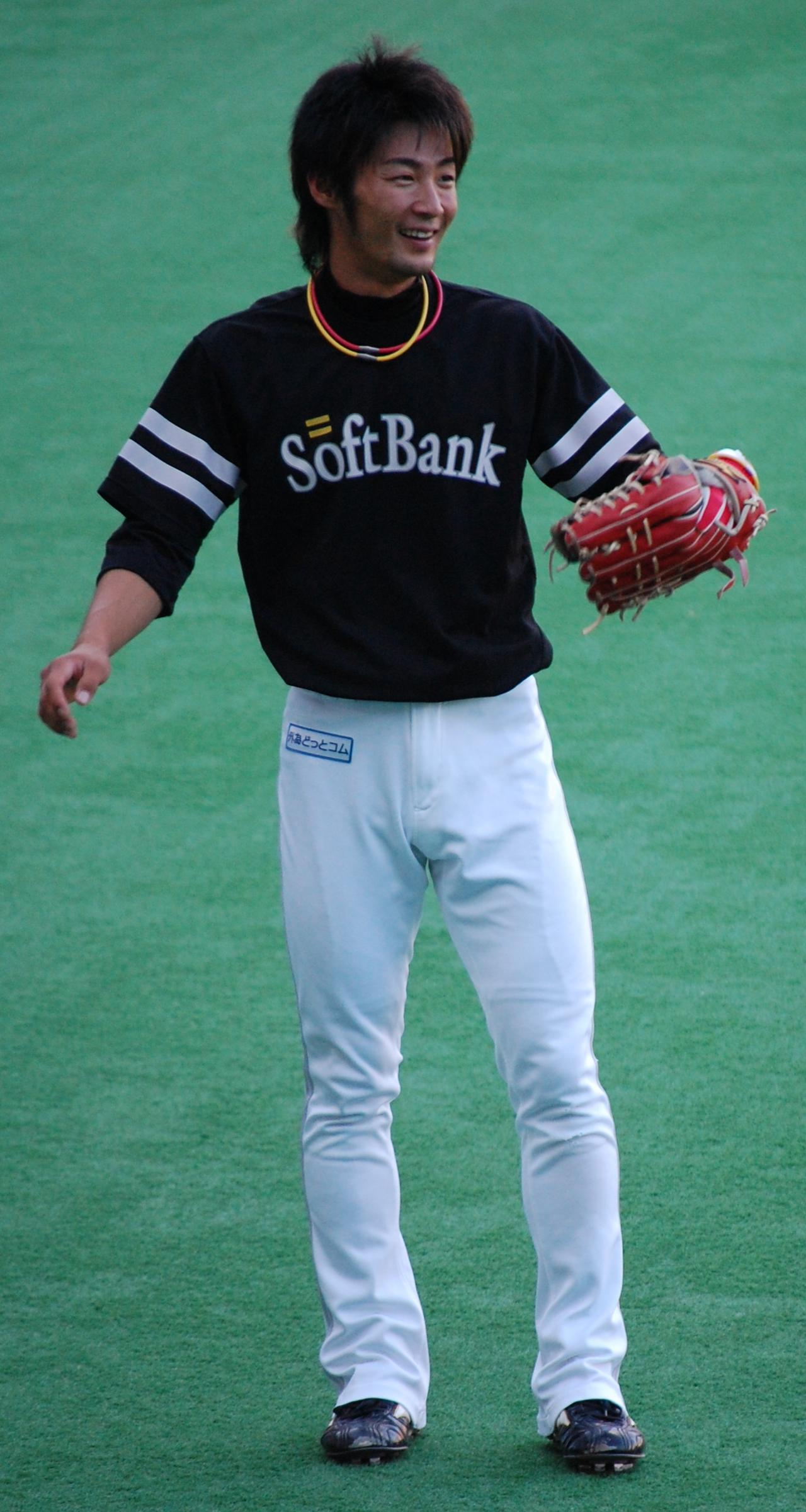 福岡ソフトバンクホークスの明石健志。2009年8月27日、千葉マリンスタジアムにて。